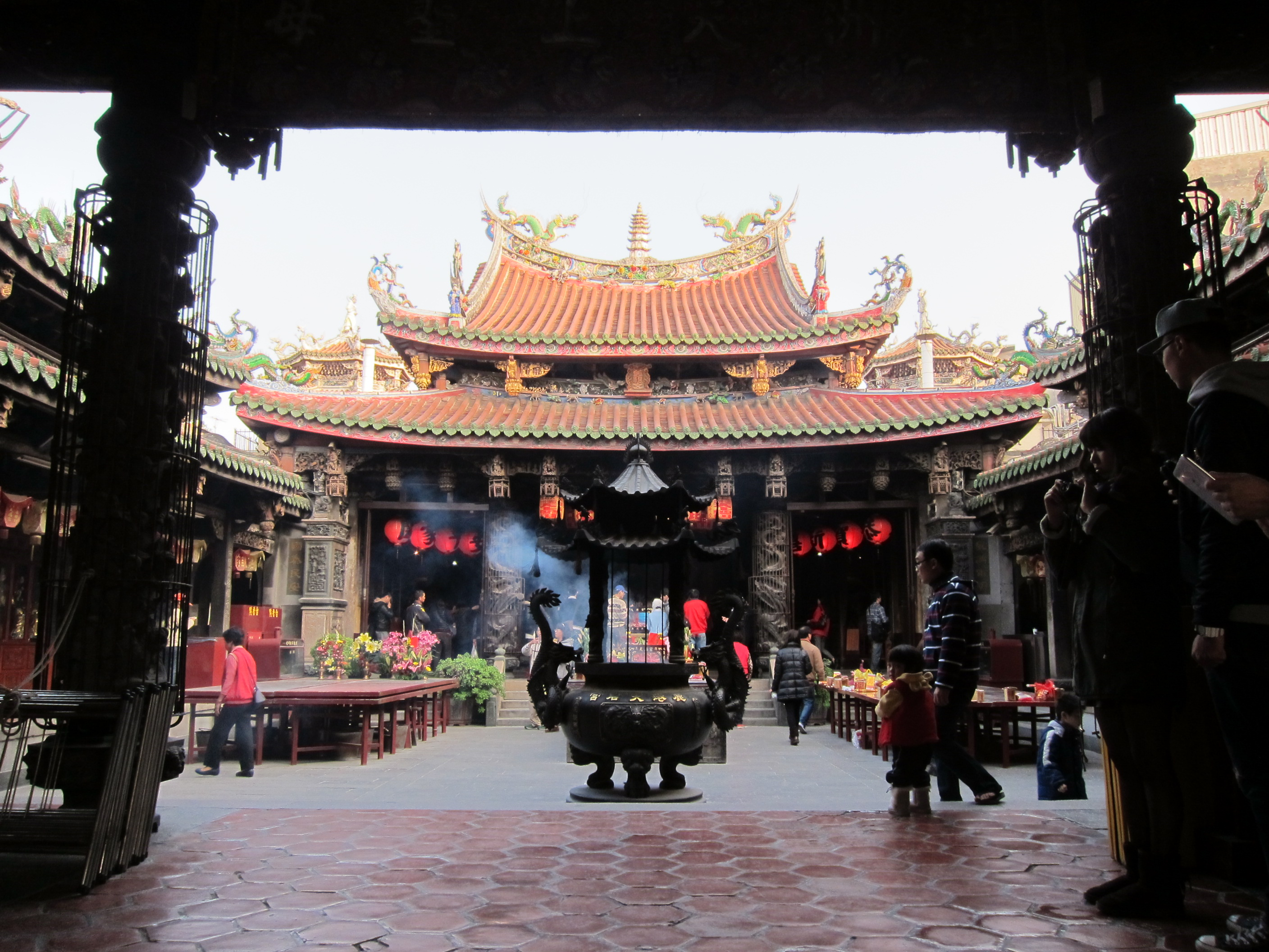 鹿港天后宮